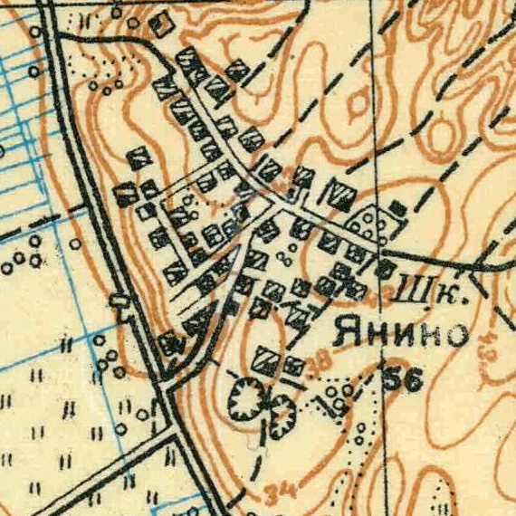 Топографическая карта Ленинградской области, квадрат О-36-2-А-а (сл. Ржевская), деревня Янино-2